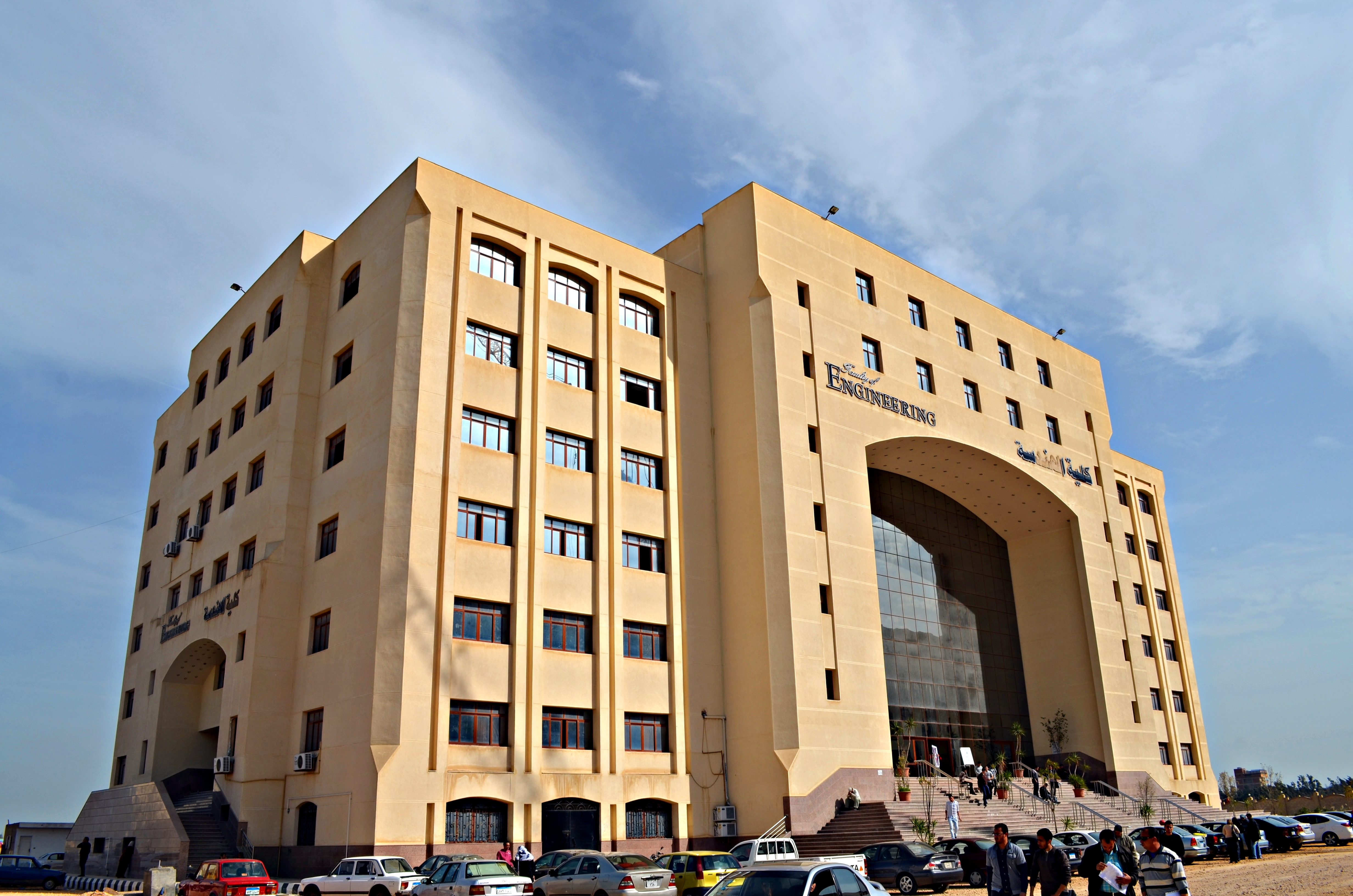 كلية الهندسة، جامعة كفر الشيخ، مدينة كفر الشيخ، مصر